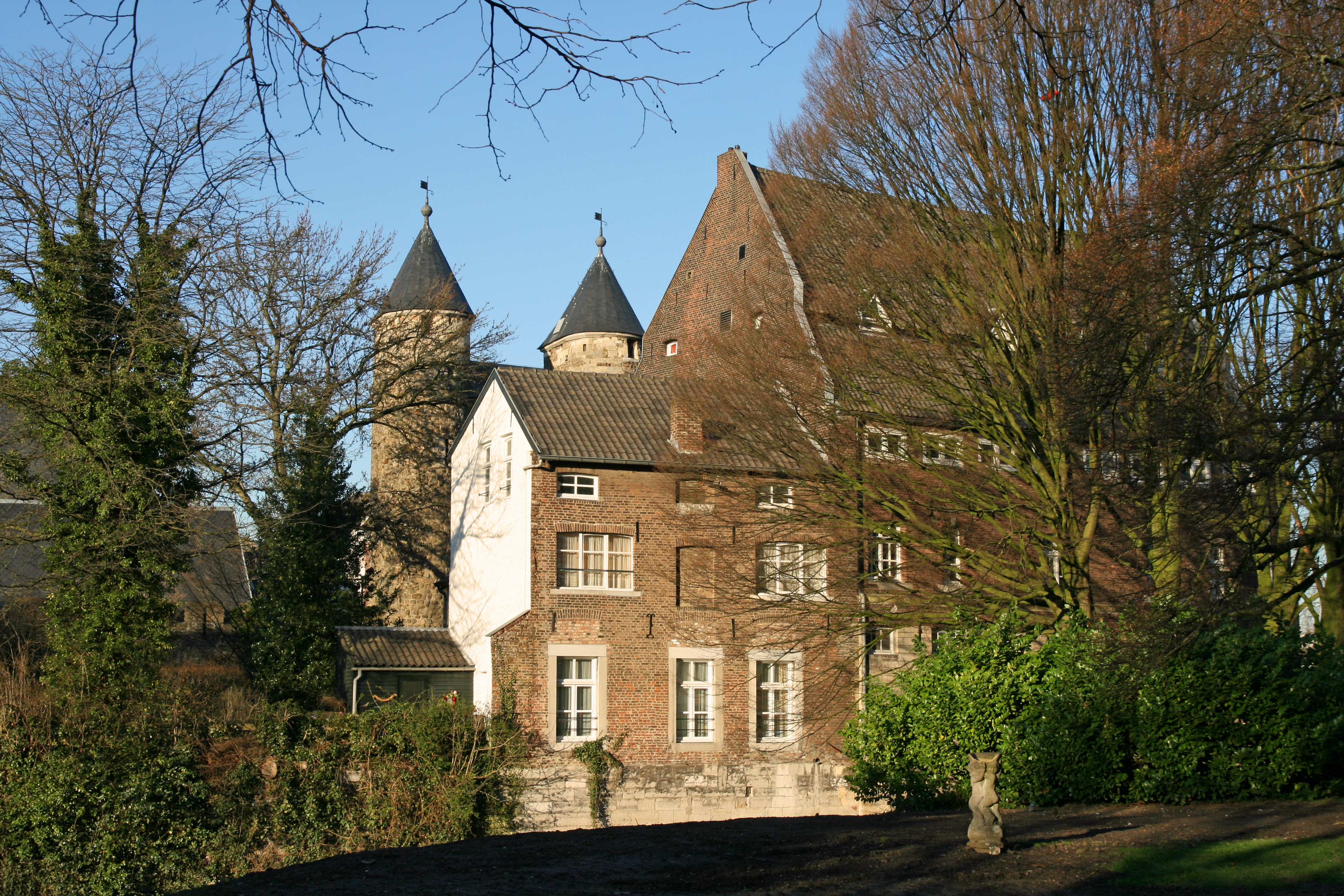 Oude papiermolen aan de Jeker